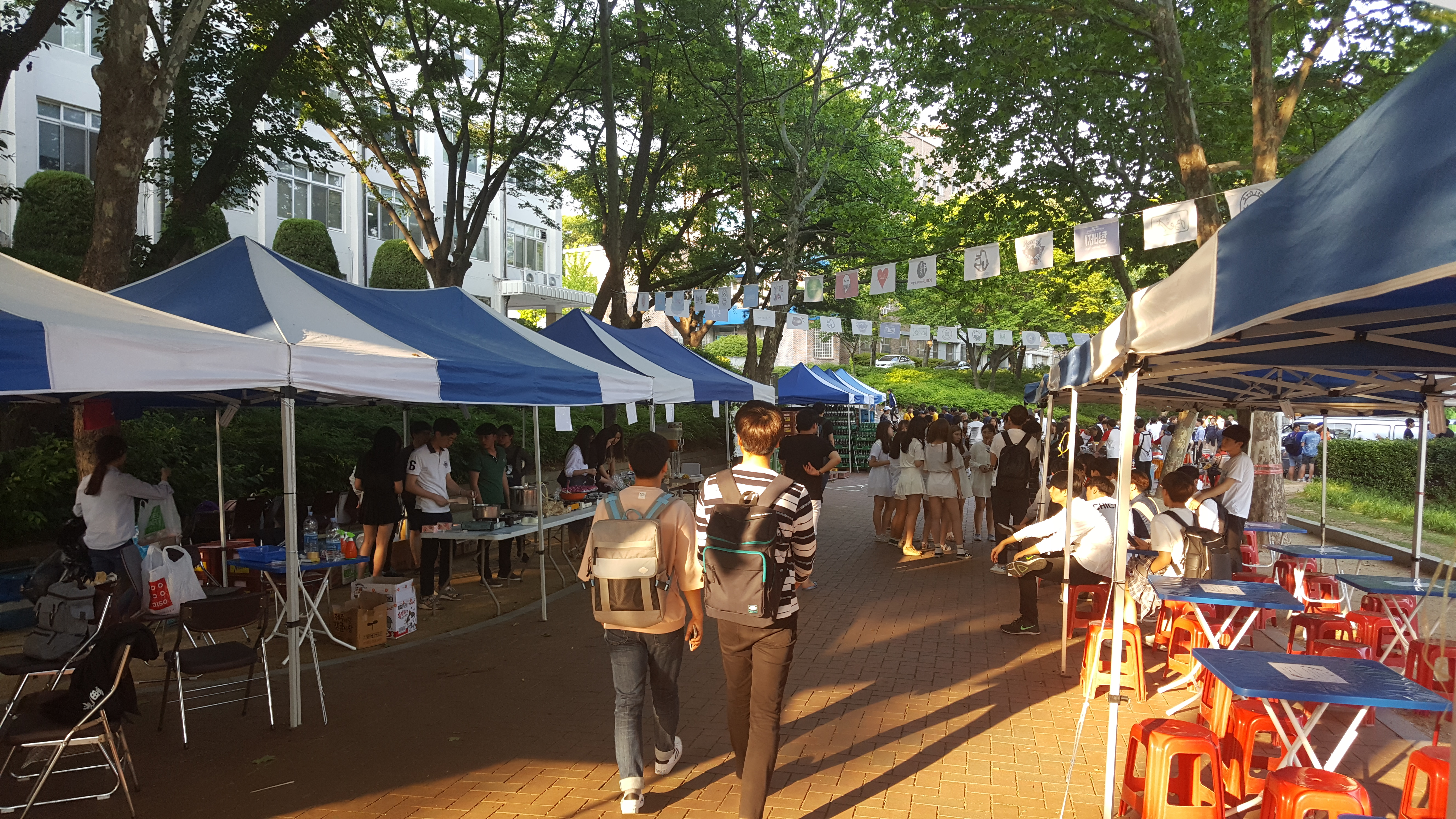 2016년 5월 경북대학교 대동제 주막 가판